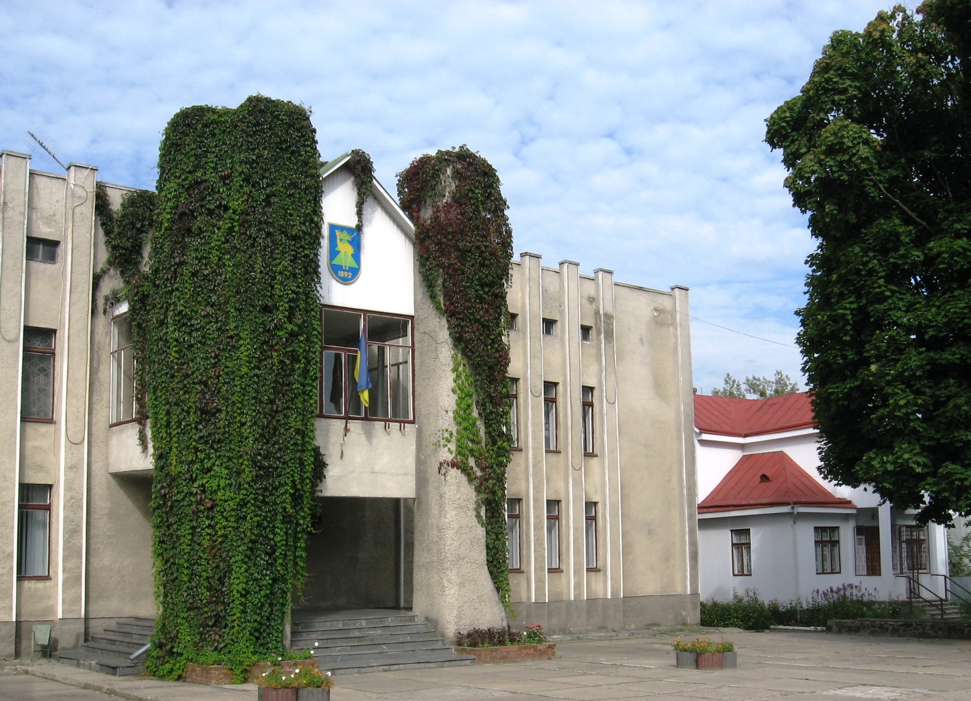 Маневицька селищна рада